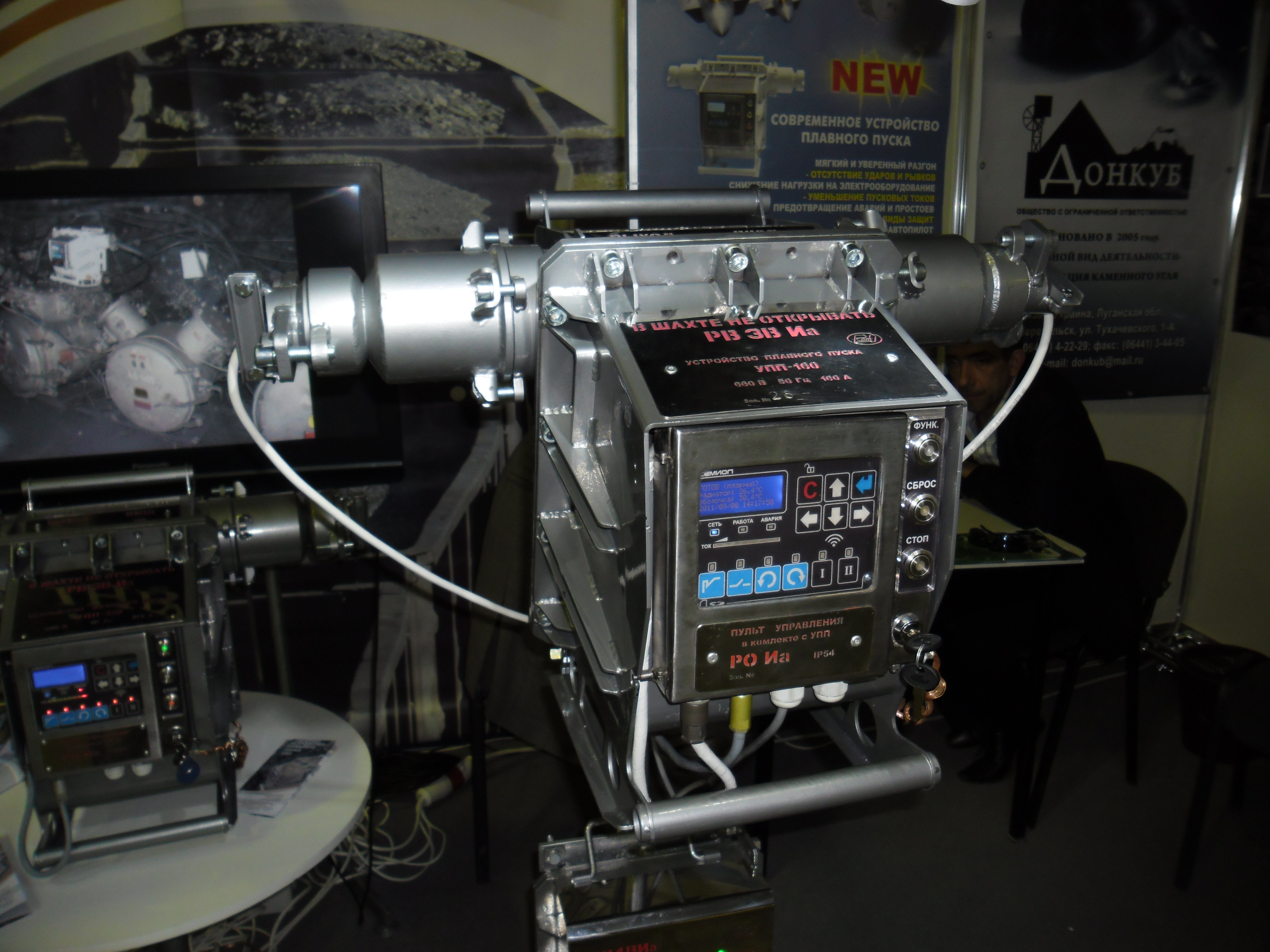 Профес. куточок: Пульт управління в комплекті з пристроєм плавного пуску УПП-160